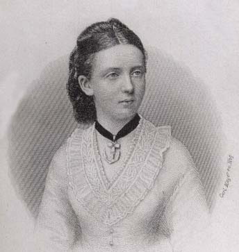 Prinzessin Maria Anna von Anhalt-Dessau (* 14. September 1837 in Dessau; † 12. Mai 1906 in Friedrichroda). Stich um 1860.